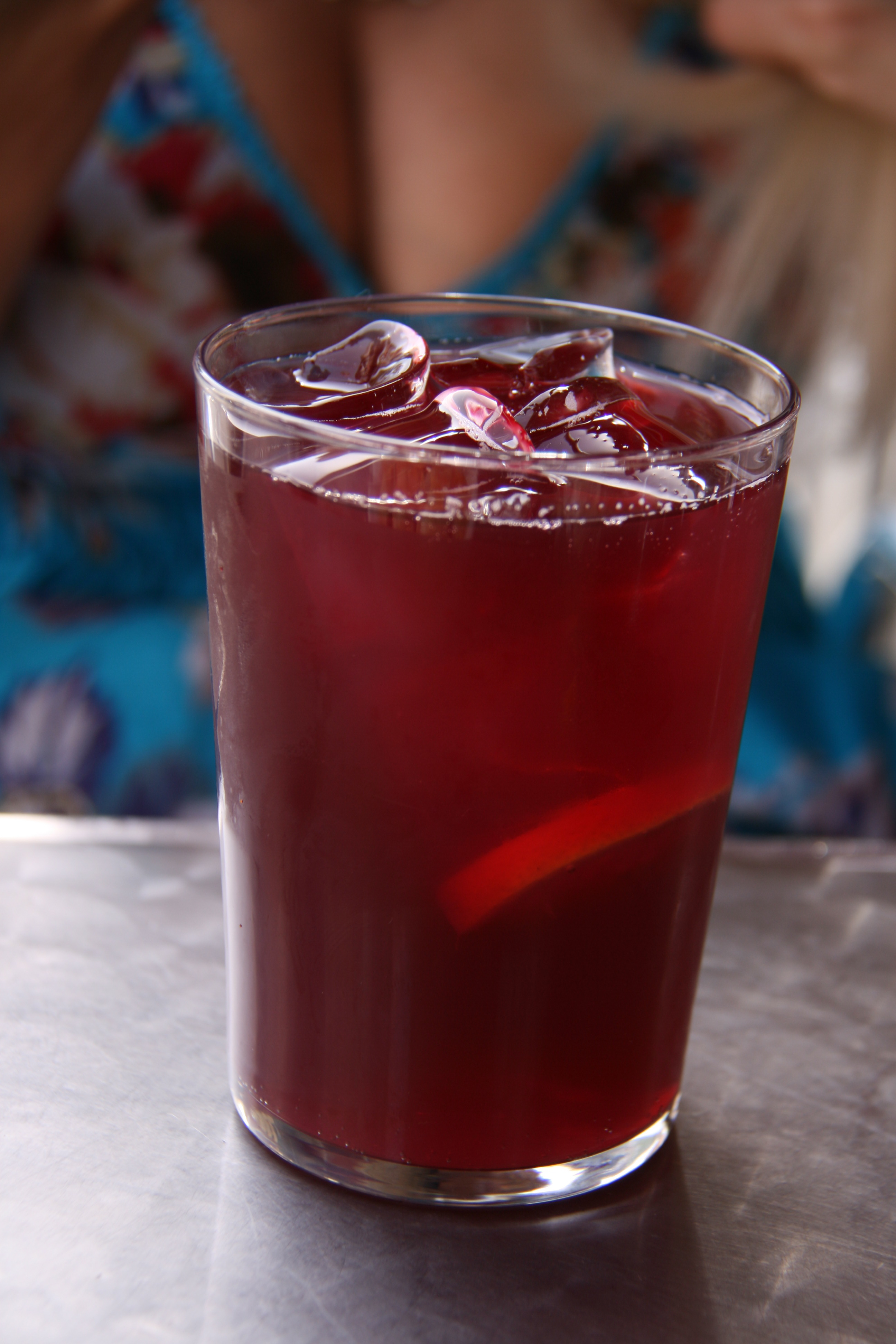 Tinto de verano - Servido en cristal